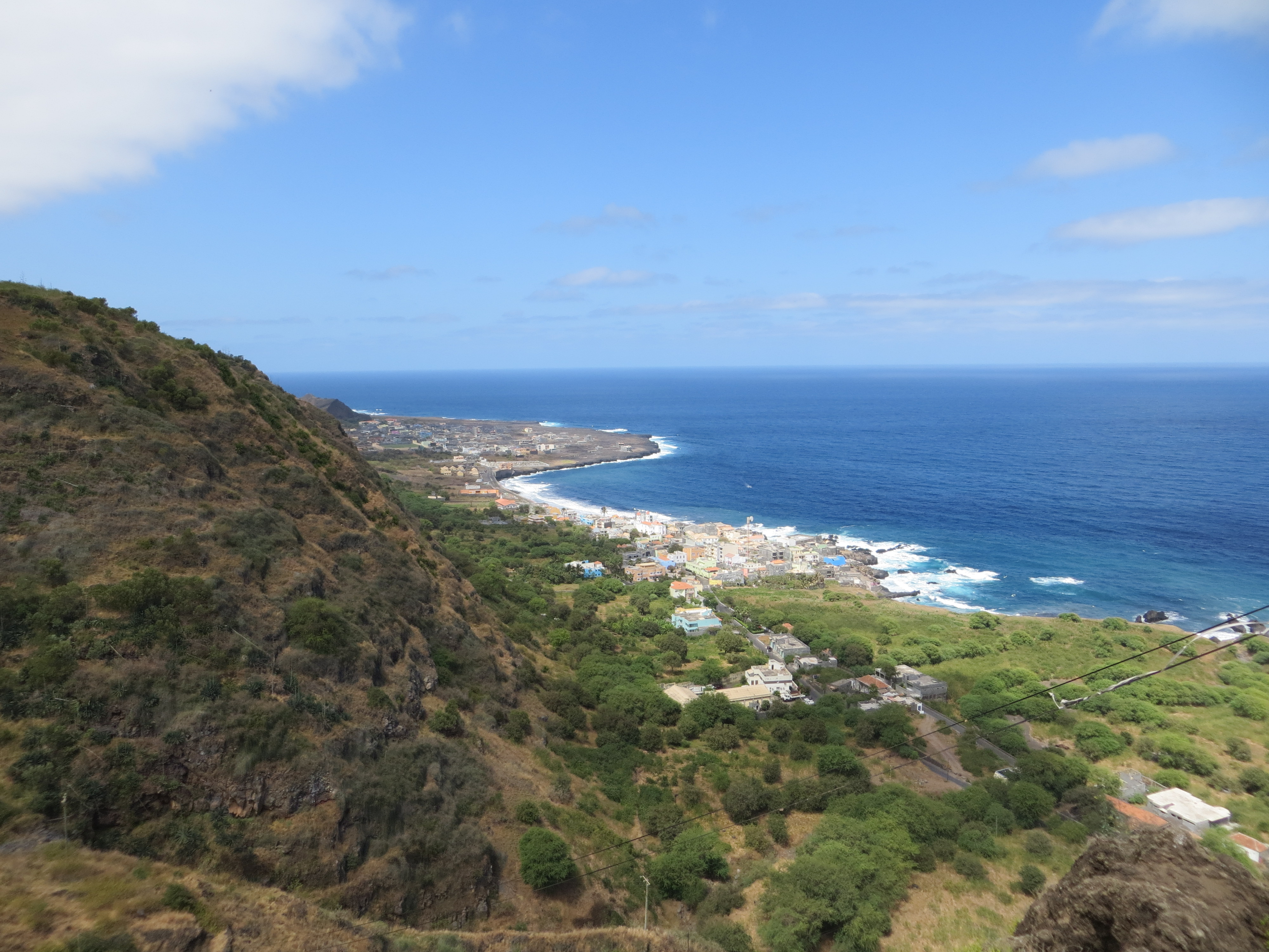 Landschaft auf Fogo